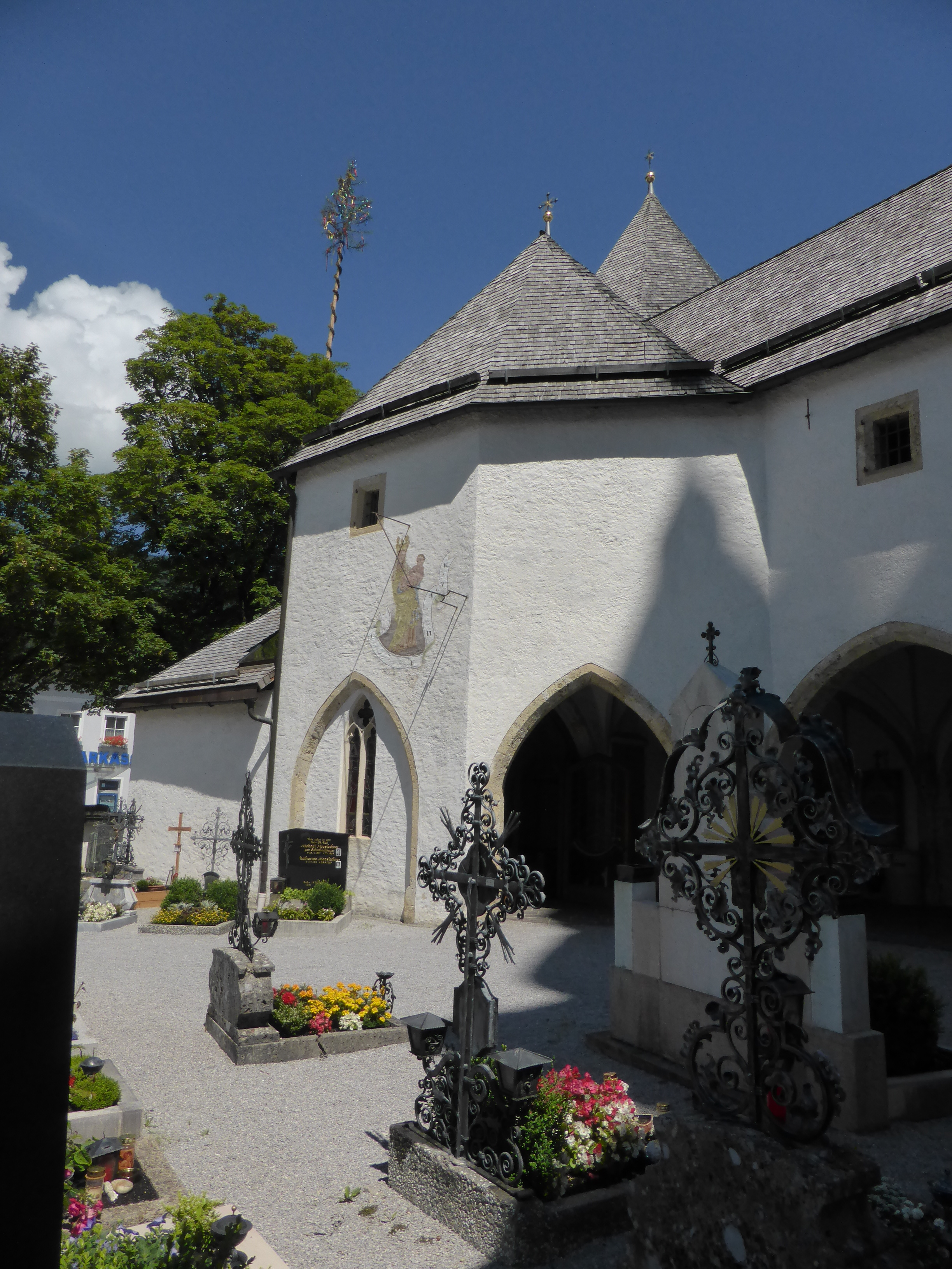 Friedhof und Lourdeskapelle